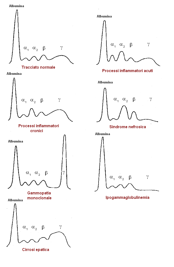 Tracciato elettroforetico delle sieroproteine